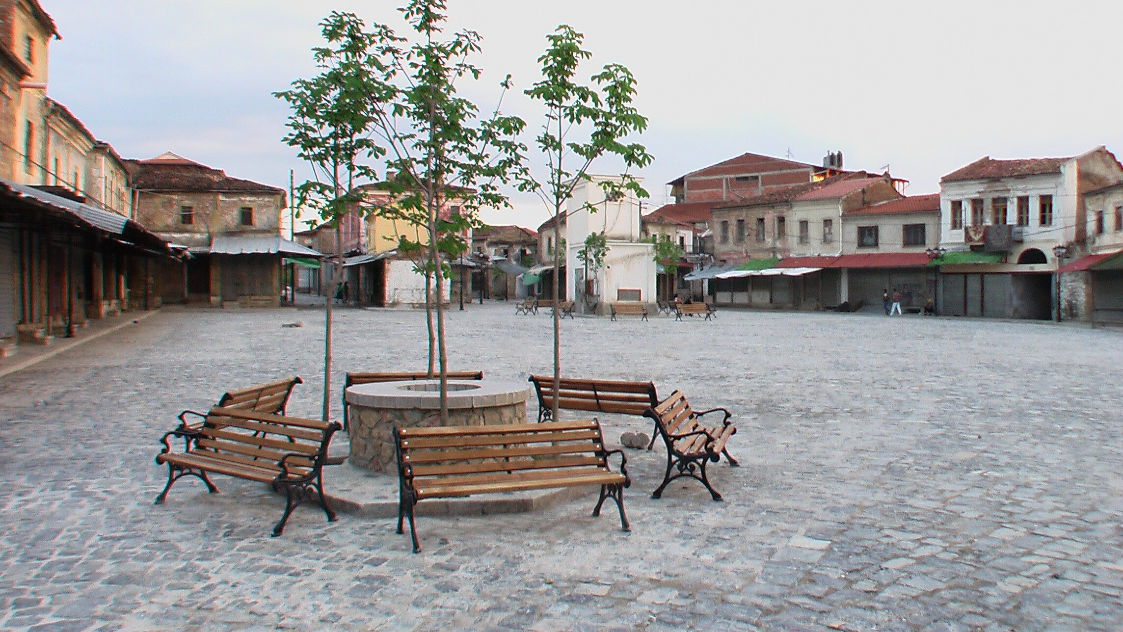 KorçaMarktplatz